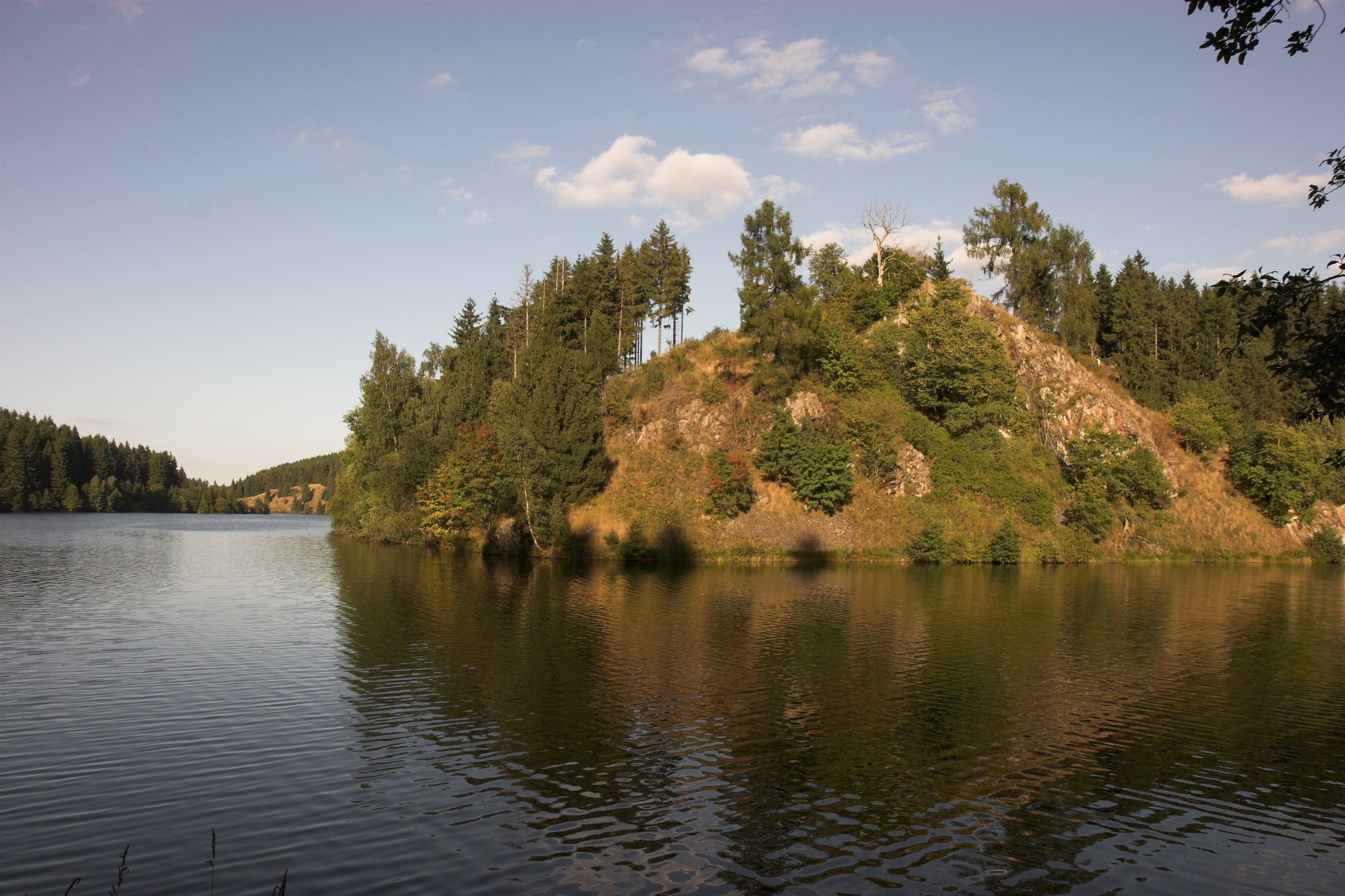 Die Rappbodevorsperre mit dem Felsen, auf dem einst die Trageburg stand